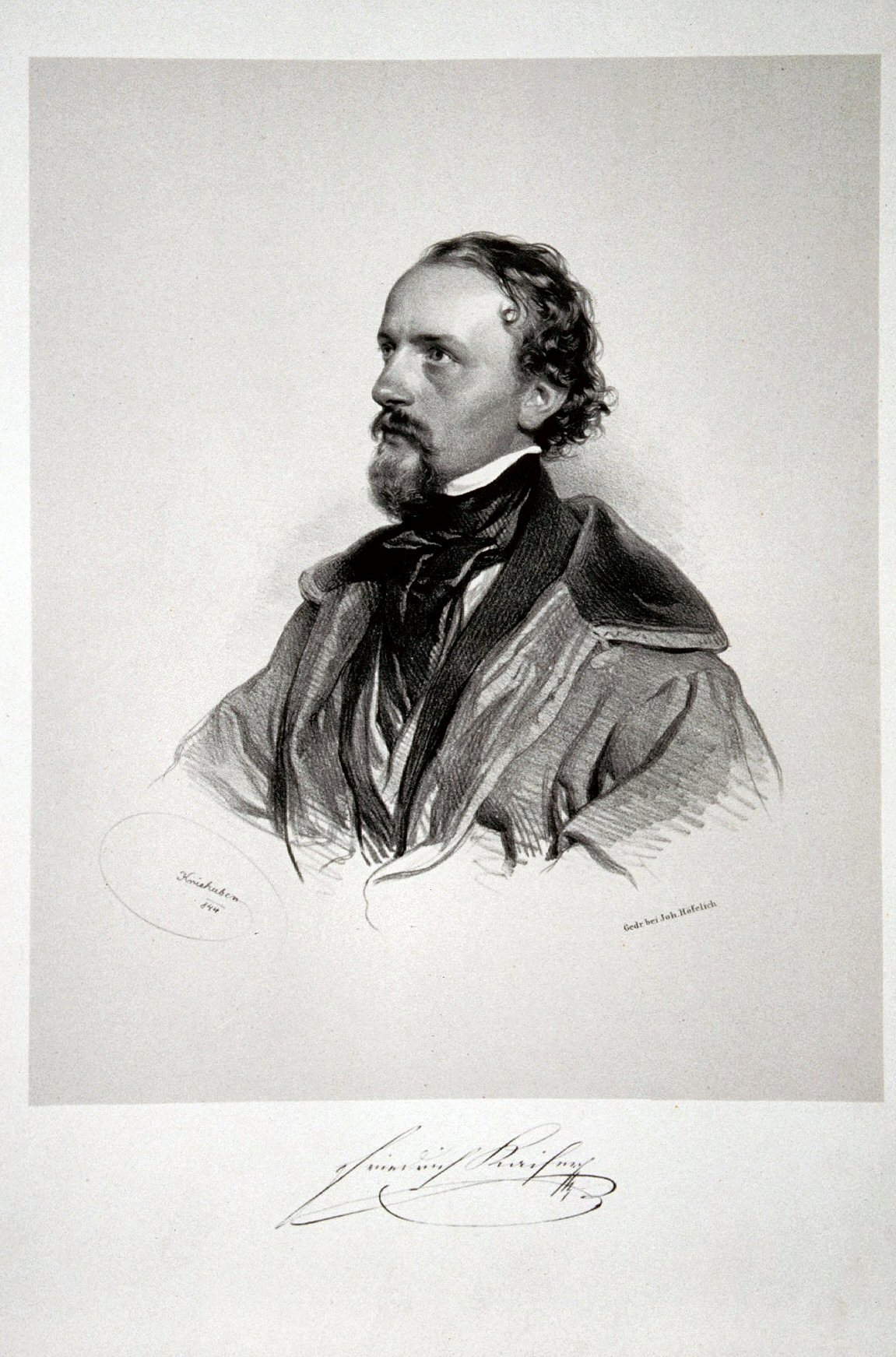 Friedrich Kaiser (1814-1874), österreichischer Schaauspieler und Schriftsteller.